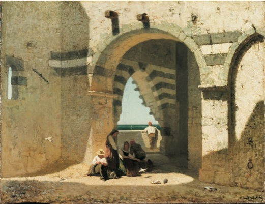 Avanzi della chiesa di San Pietro a Portovenere